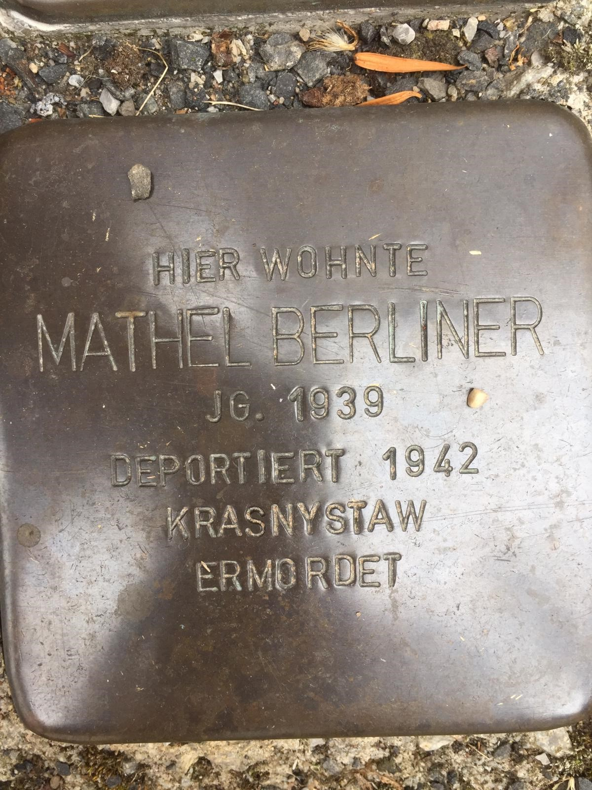 Stolperstein